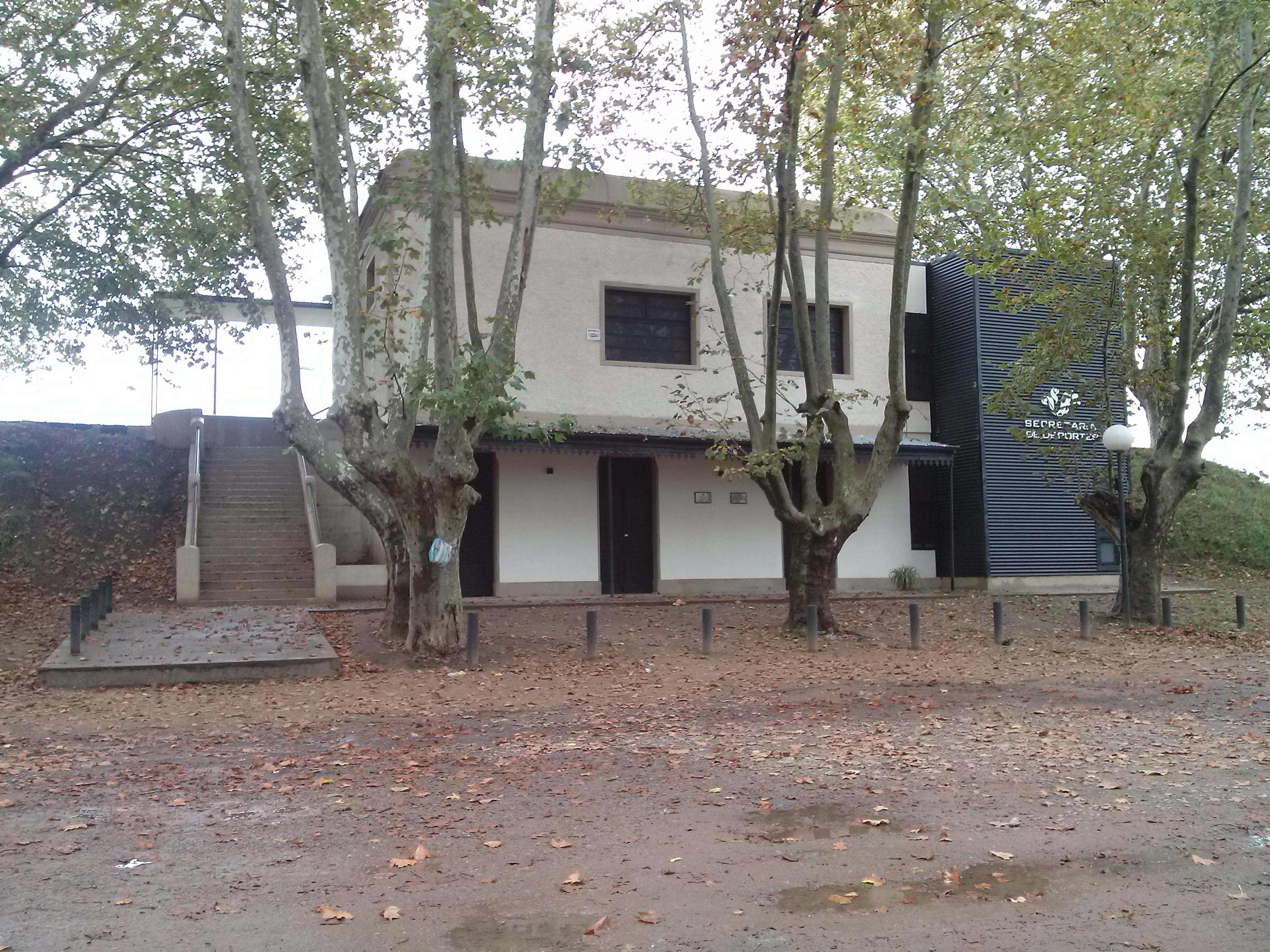 parada ortiz de rosas ex km 202 del FCPBA